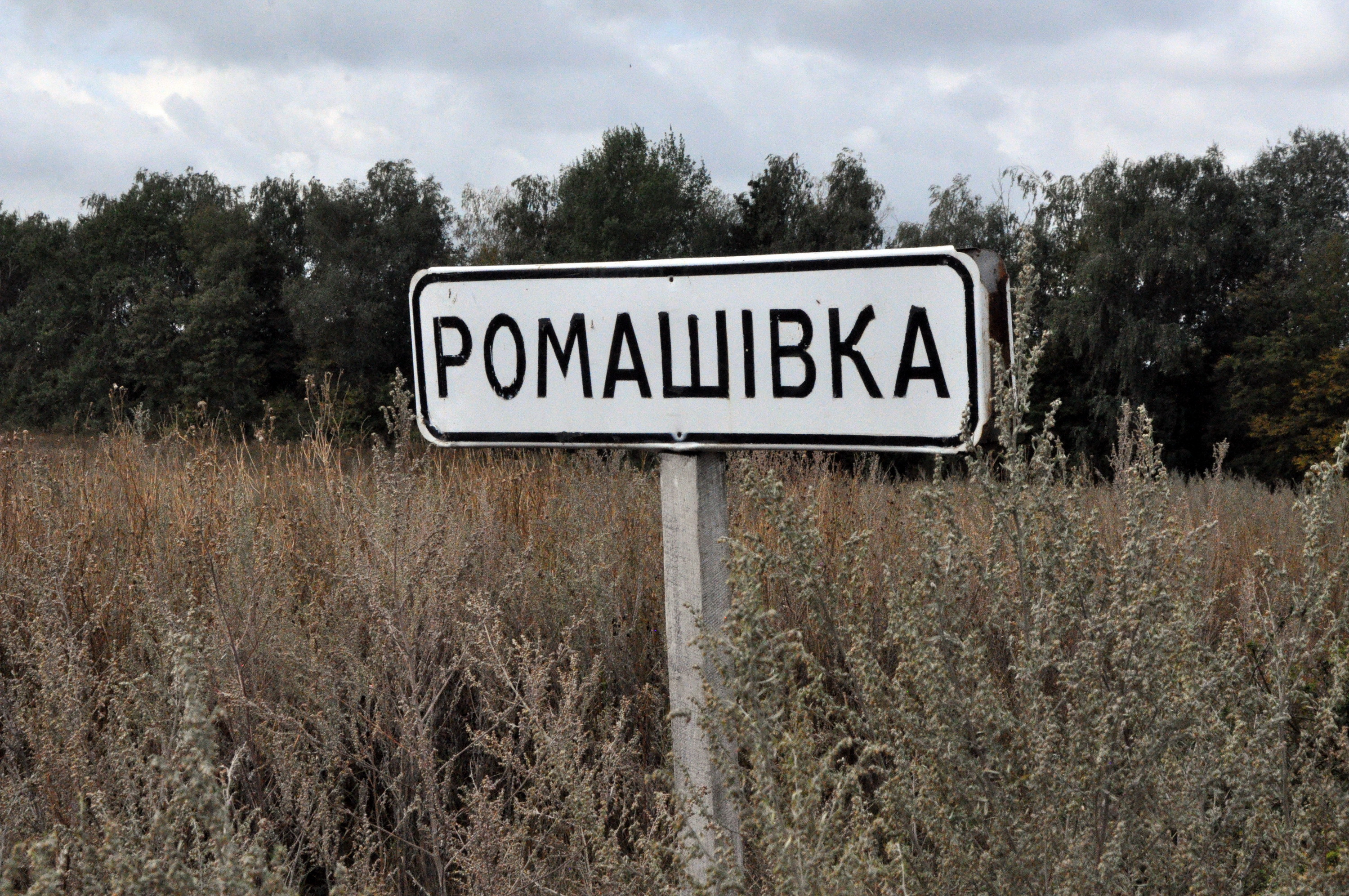 Знак при в'їзді в село Ромашівка Чортківського району Тернопільської області України.